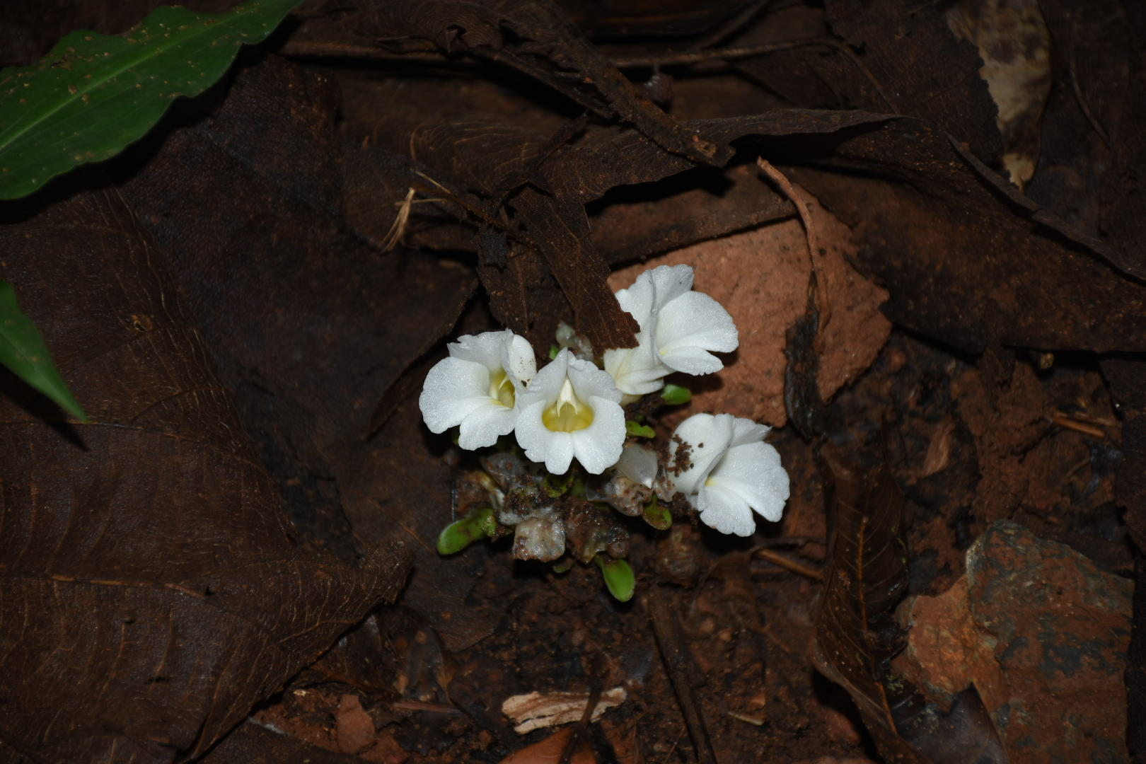 ഇഞ്ചികുടുംബത്തിൽപ്പെട്ട സപുഷ്പി സസ്യമാണ് കാളമുഖം. വേനൽക്കാലത്തിന്റെ അവസാനത്തിലാണ് ഇത് പൂവിടുന്നത്. വെളുത്ത നിറമുള്ള പൂക്കൾക്കുള്ളിൽ കാളത്തലയുടെ രൂപം കാണാവുന്നത് കൊണ്ടാണ് കാളമുഖം, ഏരുമൂരി എന്നീ പേരുകൾ വന്നത്.